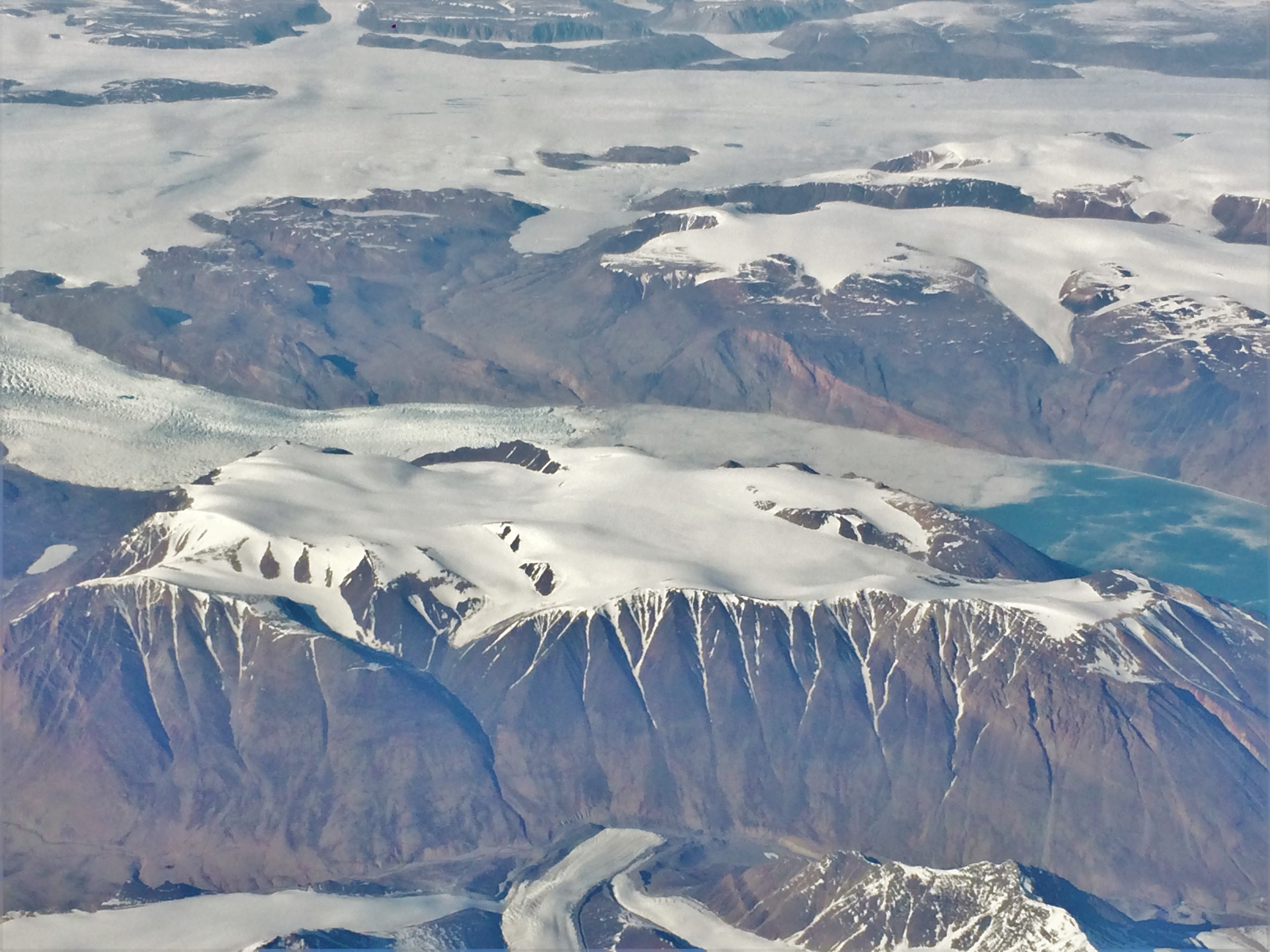 Fiordo Geologfjord